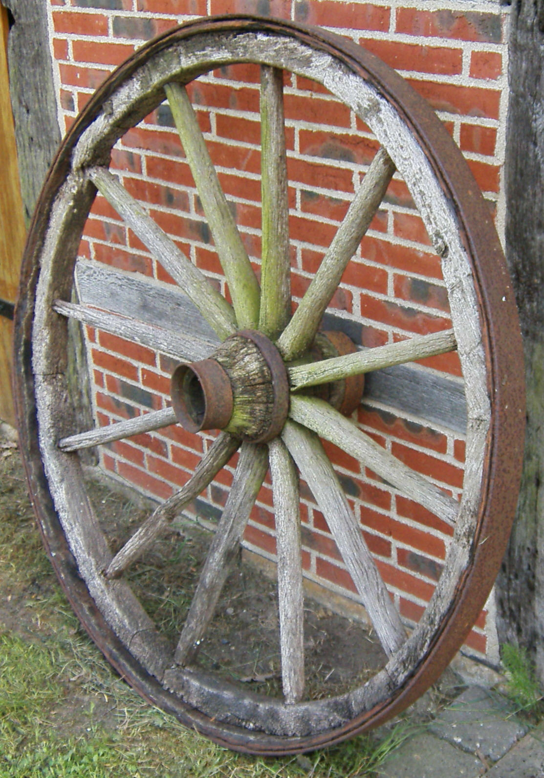 Altes Wagenrad